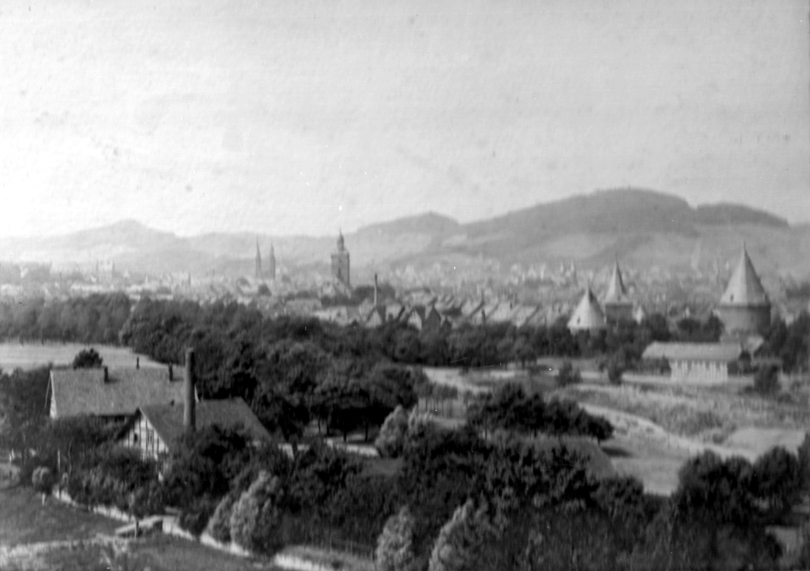 Ansicht der Garnison des Hannoverschen Jäger-Bataillons Nr. 10